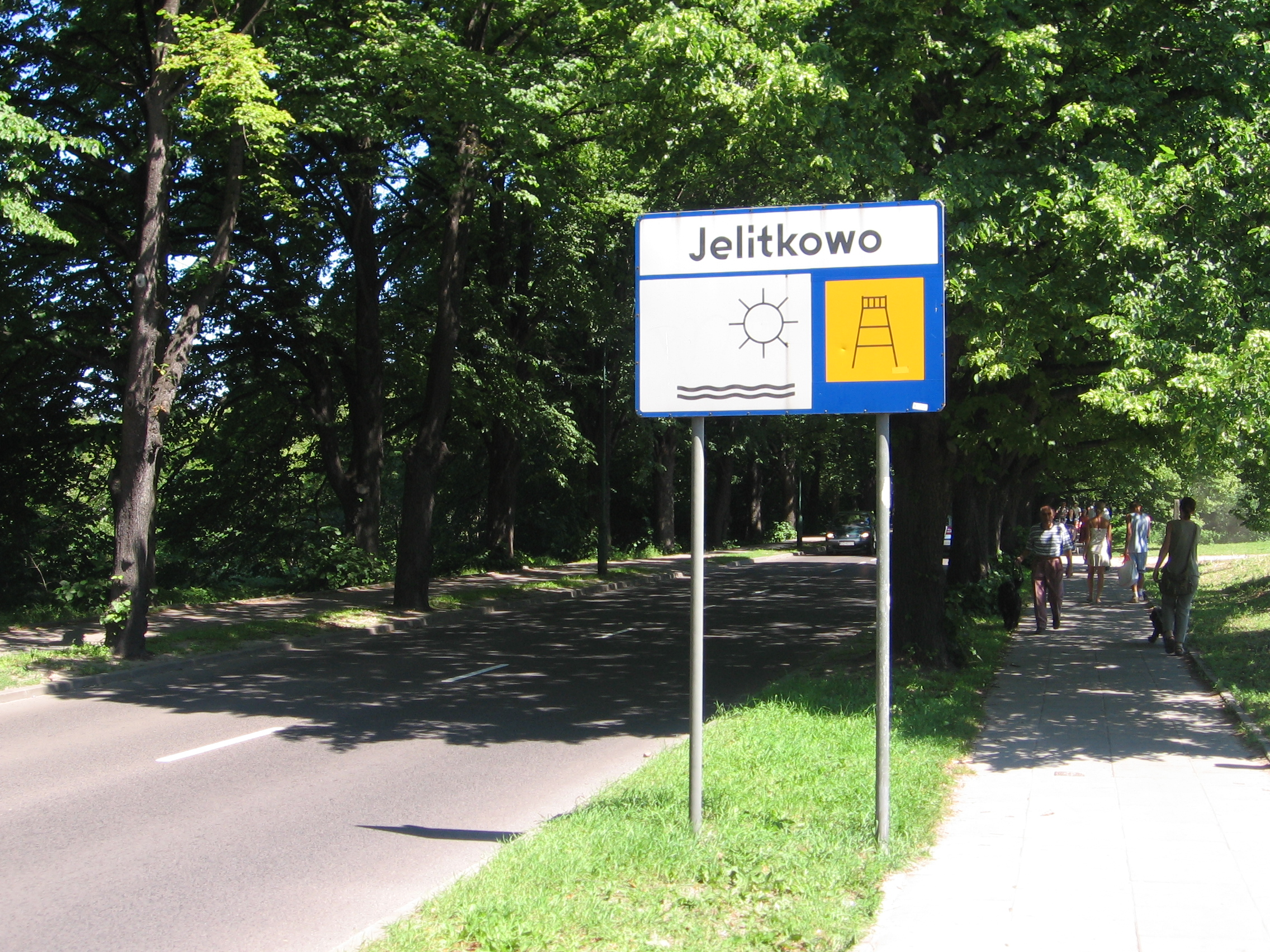 Ulica Piastowska w Gdańsku Jelitkowie. Granica między Przymorzem Wielkim i Jelitkowem